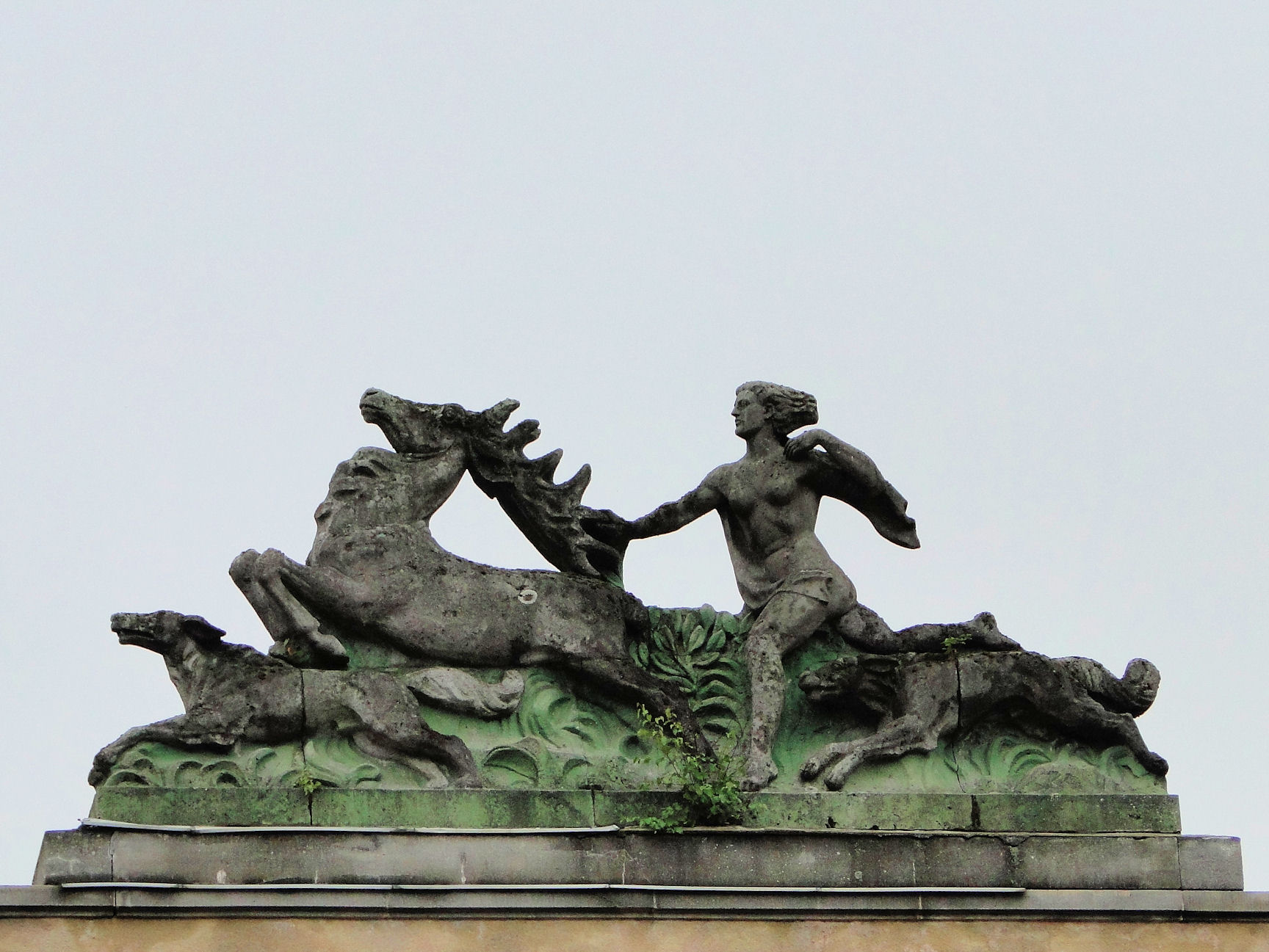 Borne Sulinowo